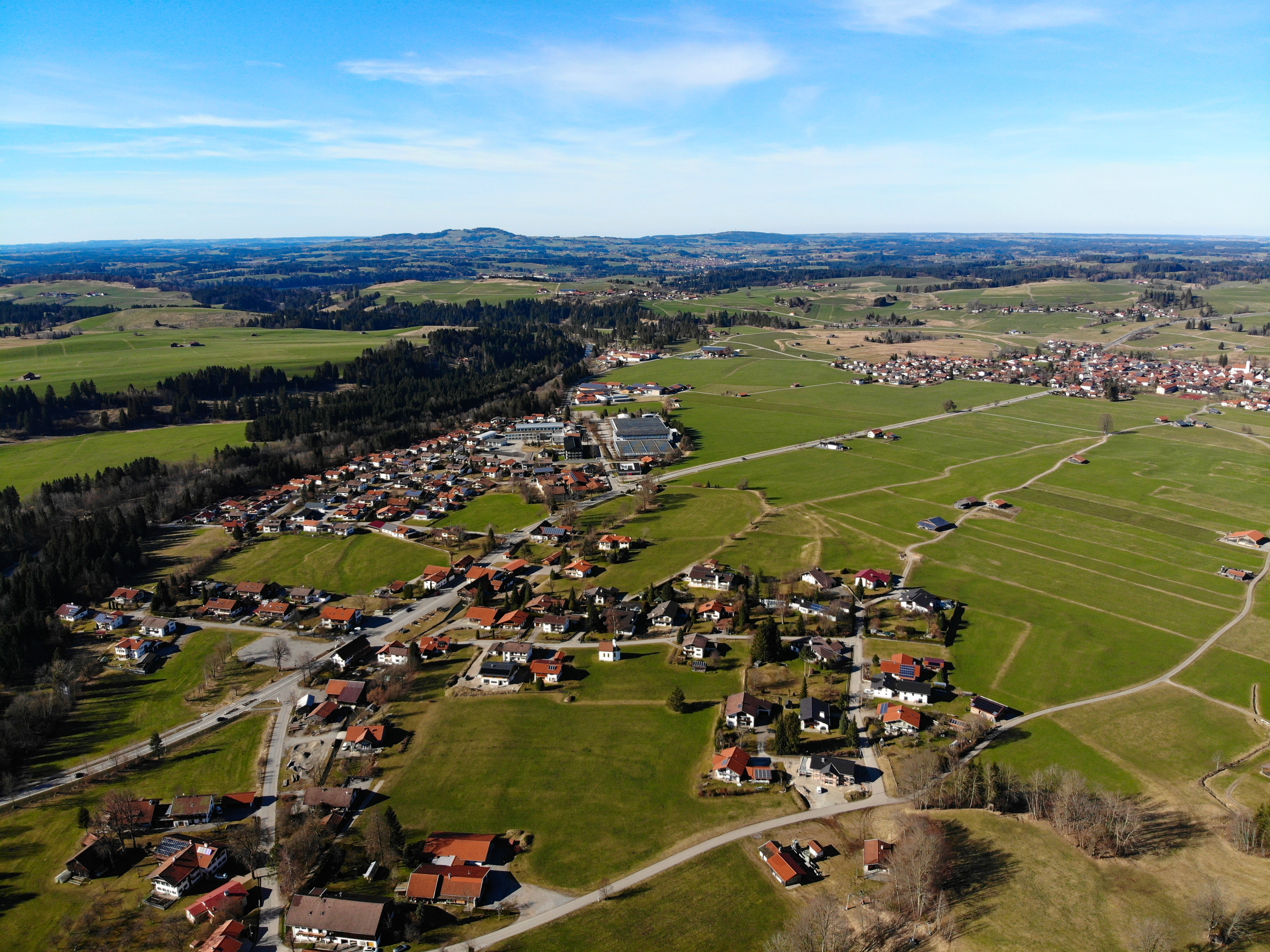 Halblech Luftaufnahme (2020)